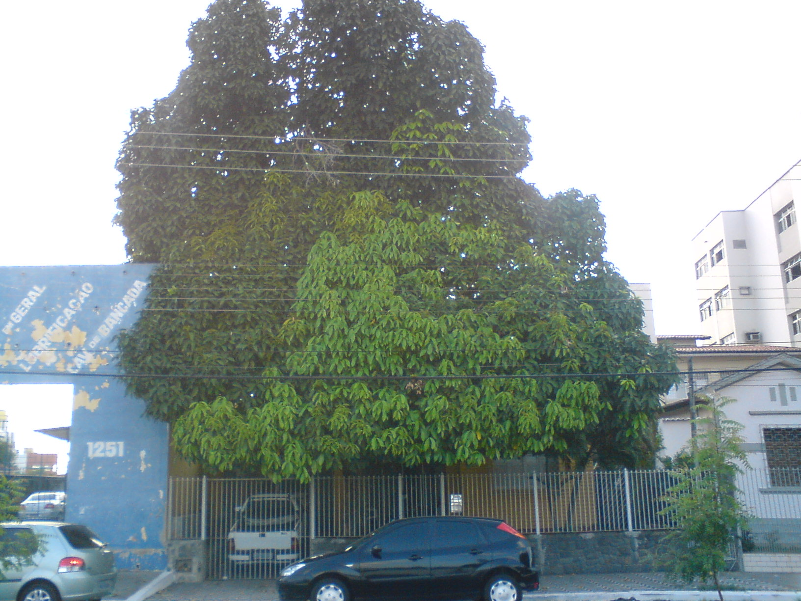 Um grande jambeiro, numa casa na Rua Olinto Meira, bairro Lagoa Seca, Natal/RN/Brasil.